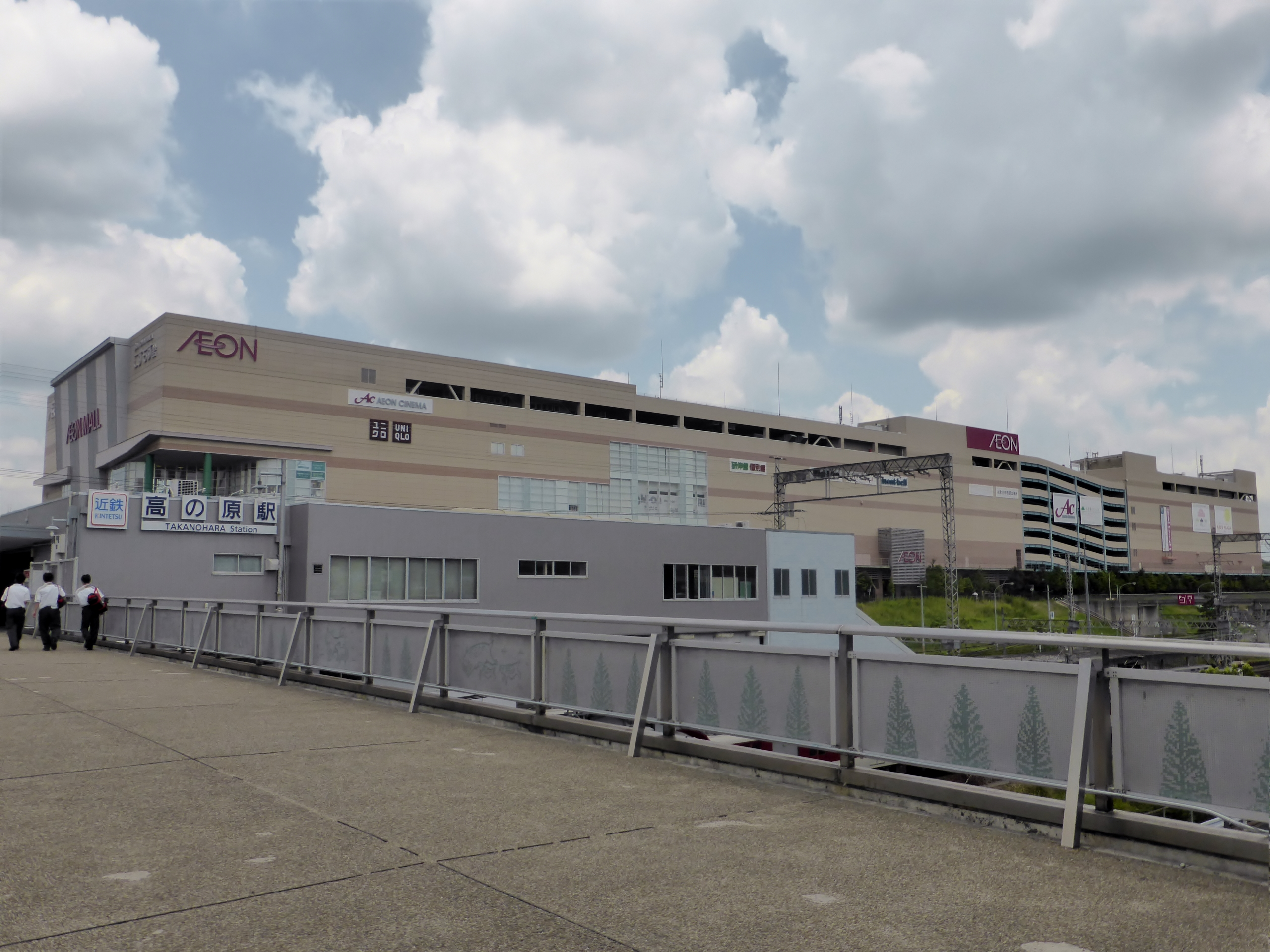 イオンモール高の原を撮影。